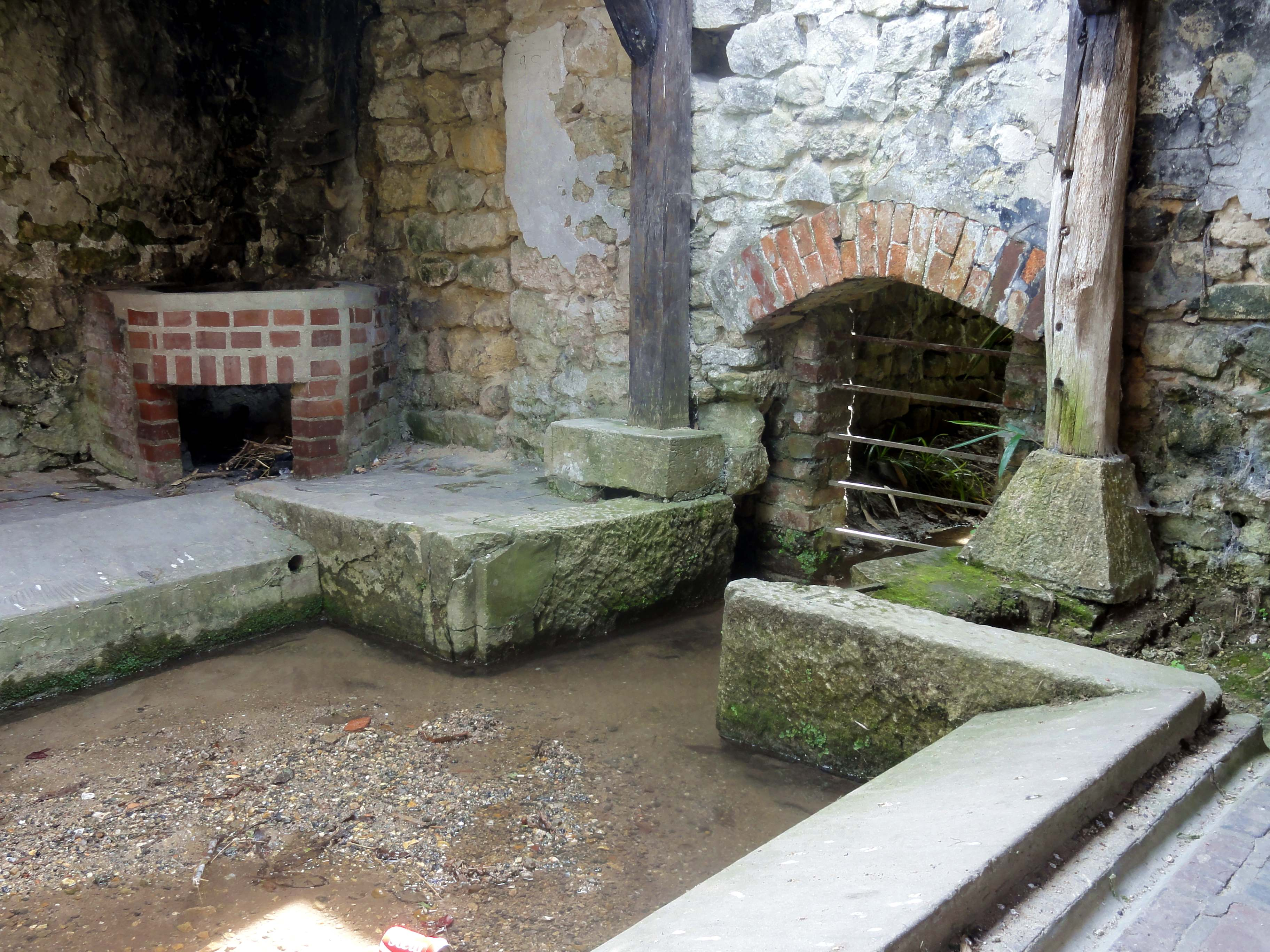 Lavoir de 1838, rebâti en 1858, établi sur un ruisseau, situé au bout de l'impasse du Lavoir, accessible depuis la rue du Moutier.